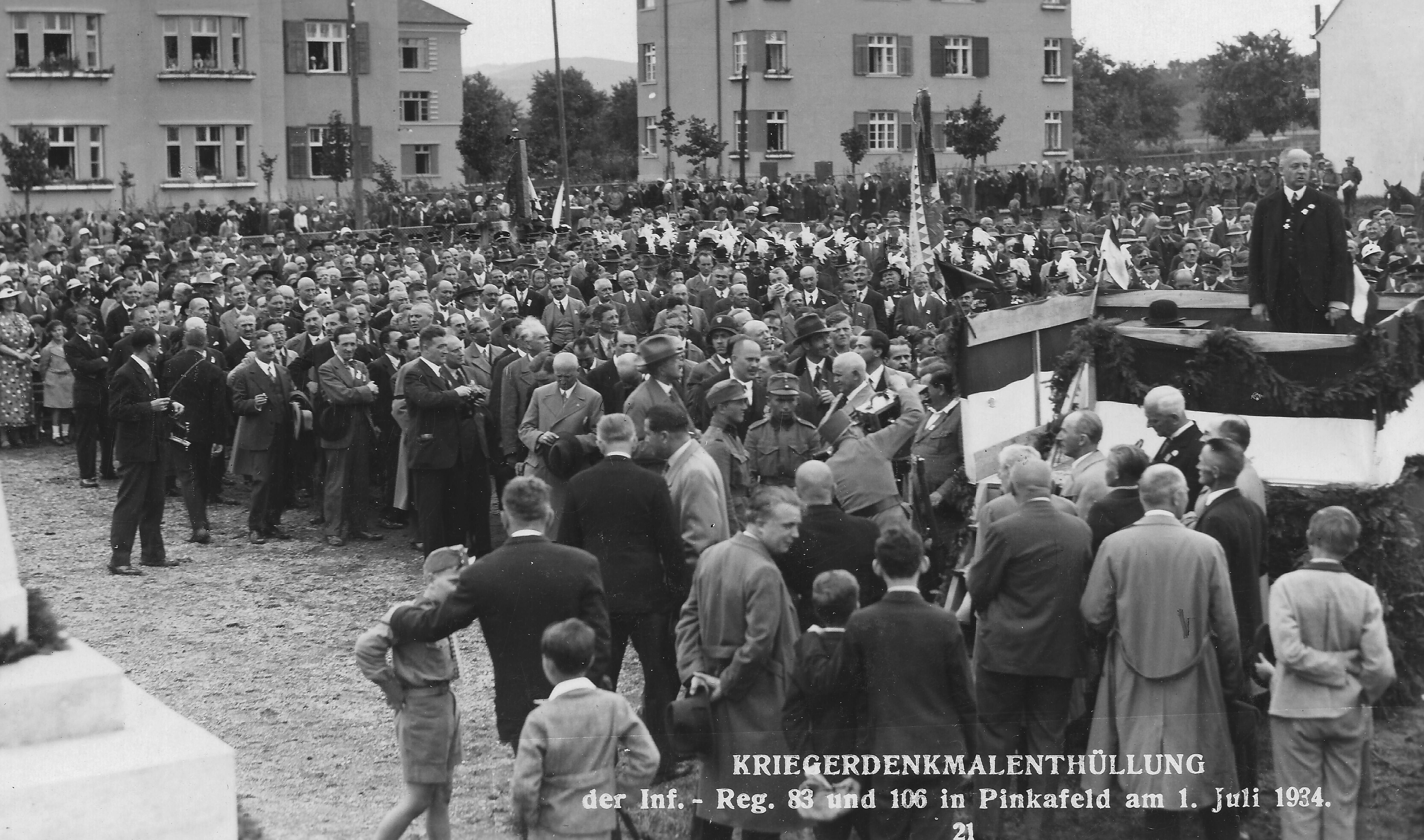 Enthüllung Denkmal für die Infanterieregimenter 83 und 106 in Pinkafeld am 1. Juli 1934